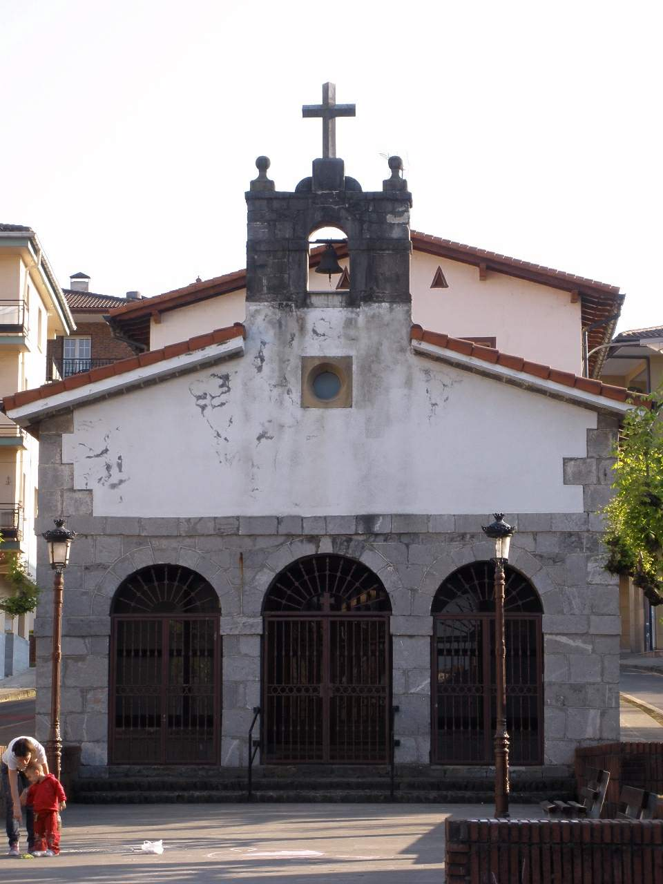 Urnieta (Gipuzkoa)